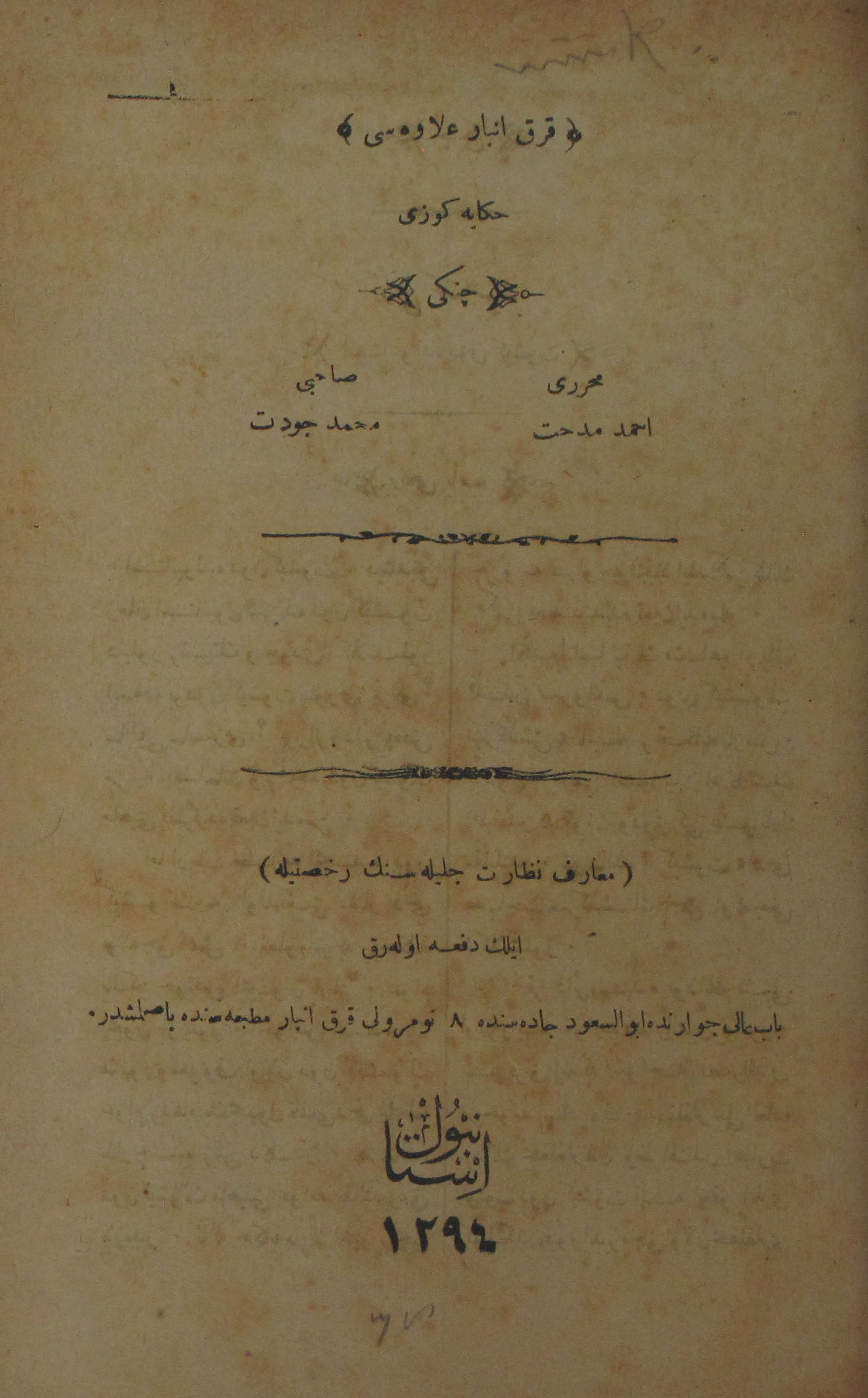 Çengi, 1877'de yayımlanan Ahmed Midhat Efendi romanı. İlkin Tercüman-ı Hakikat gazetesinde tefrika edilmiş, ardından kitap olarak yayımlanmıştır.